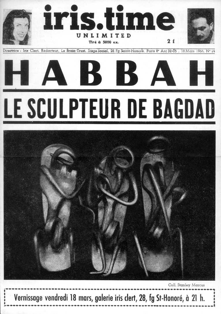 couverture du numéro Iris Time n°24 consacré à Abraham Habbah en 1966.